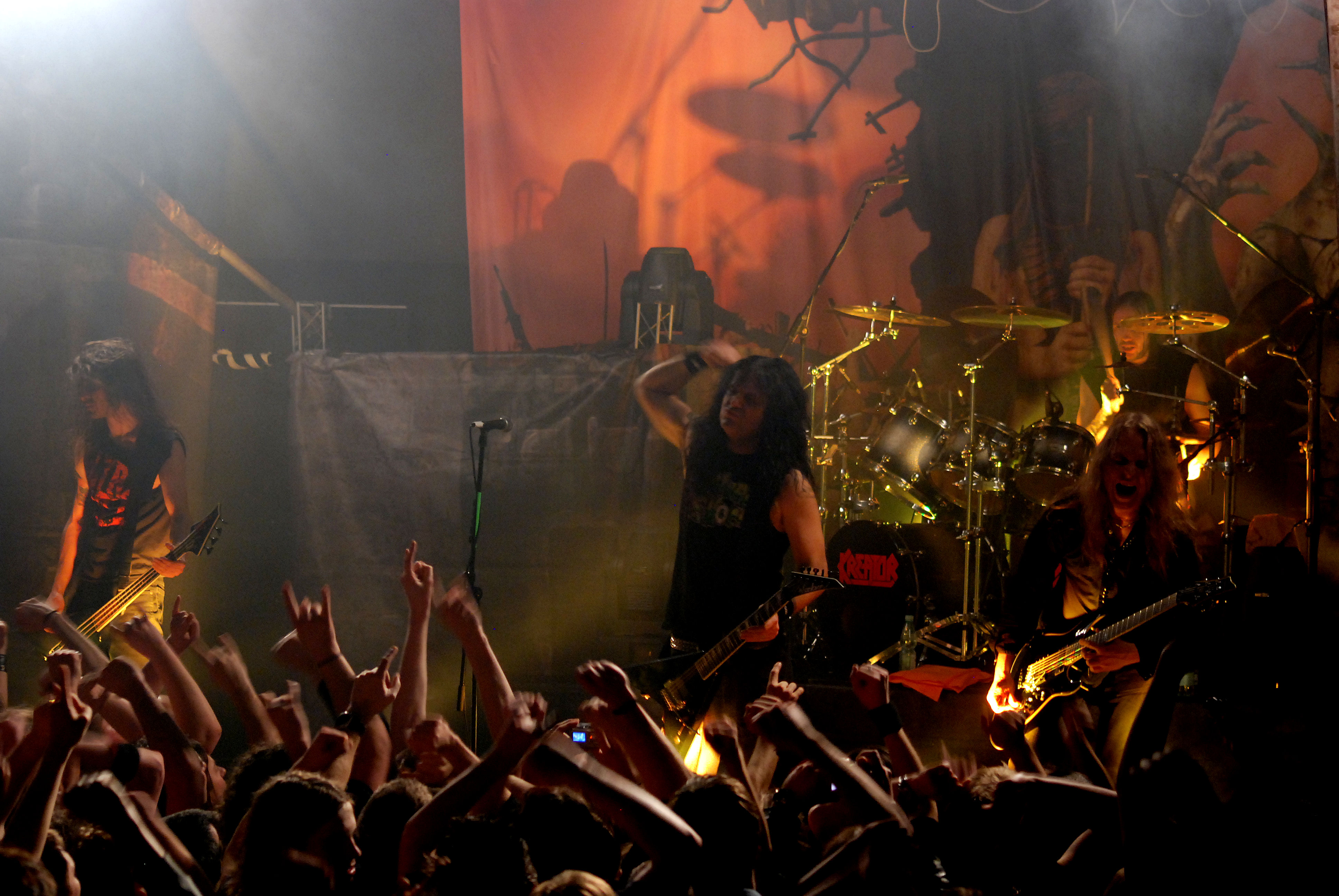 Kreator podczas koncertu w Klubie Studio w Krakowie